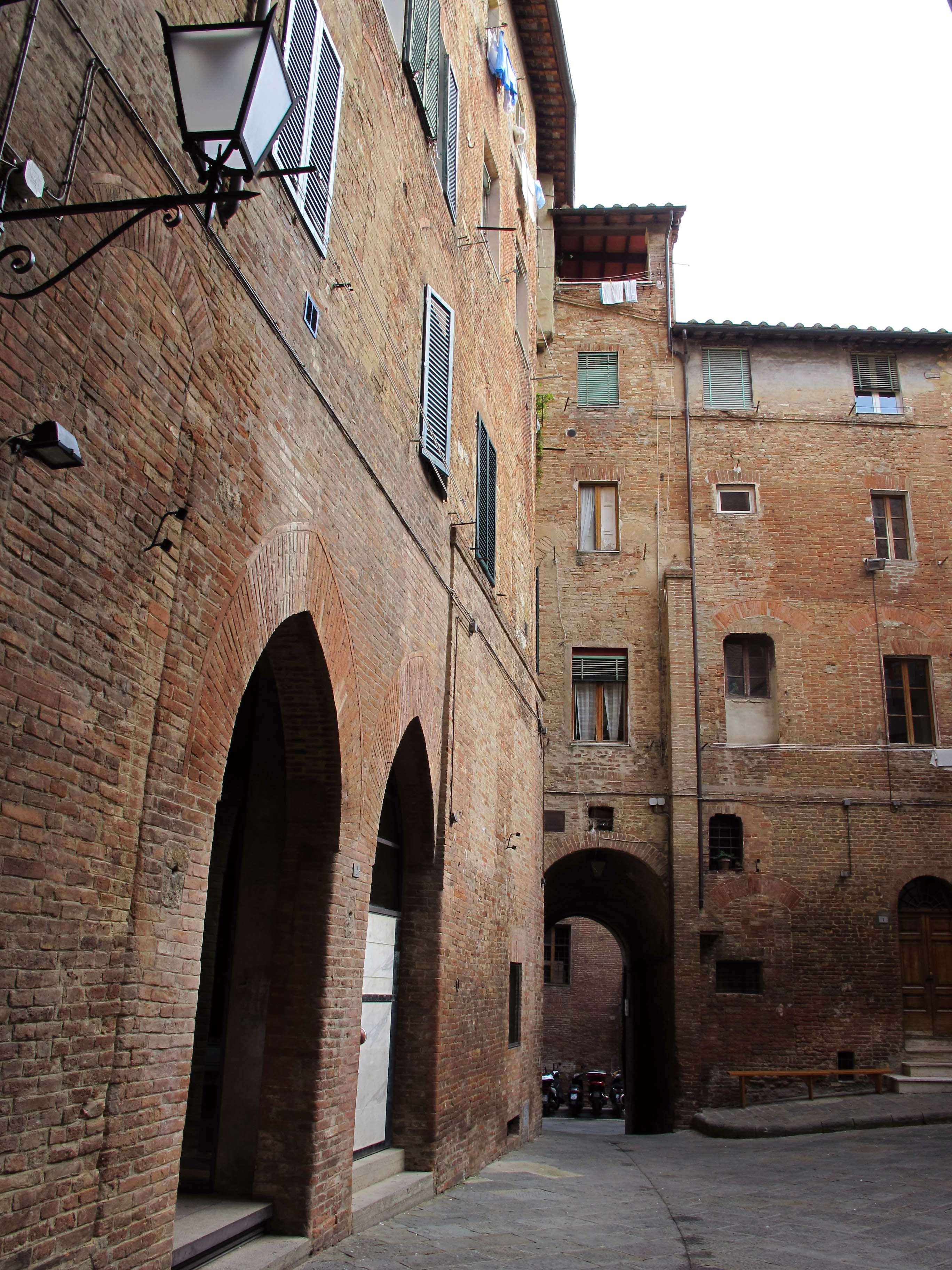 Siena